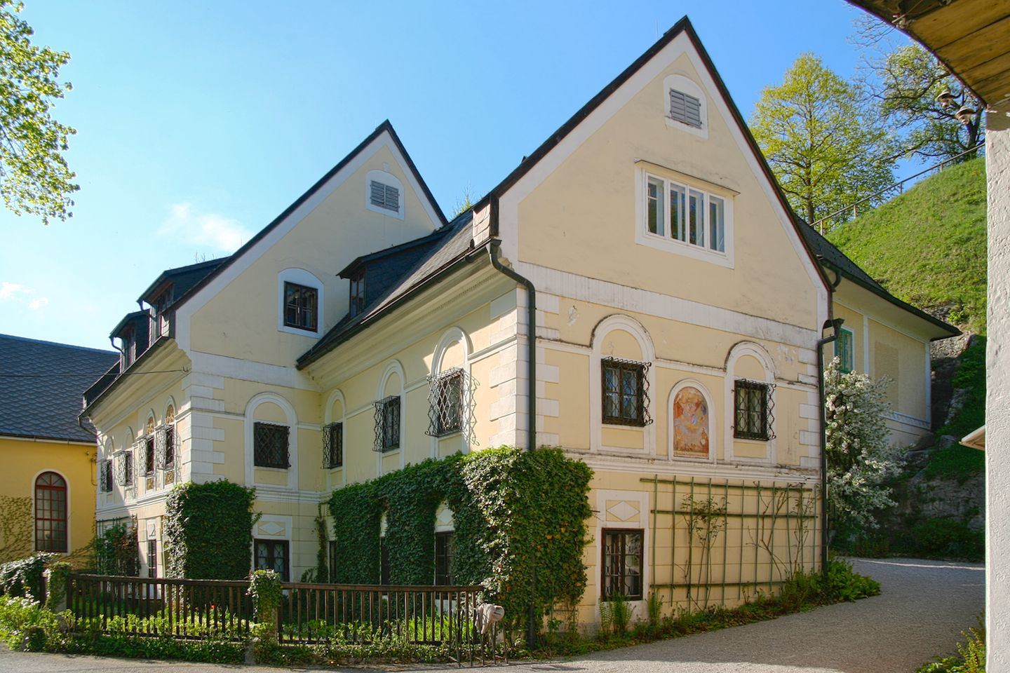 Ehemaliges Sensenwerk Schmiedleithen mit dem alten Herrenhaus